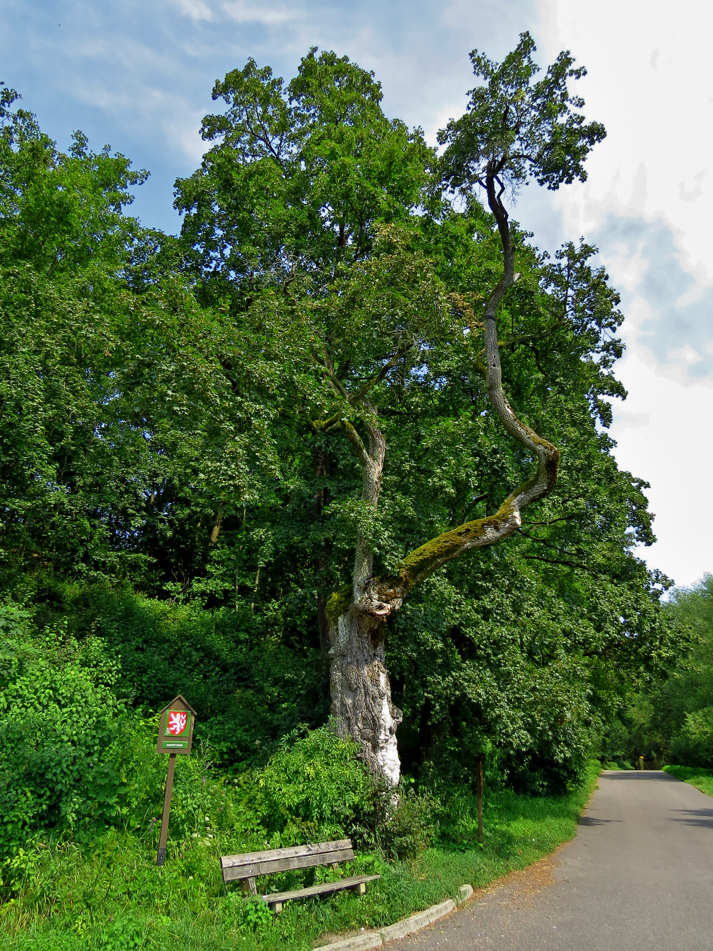 Babyka U Babky Project: Chráněná území.